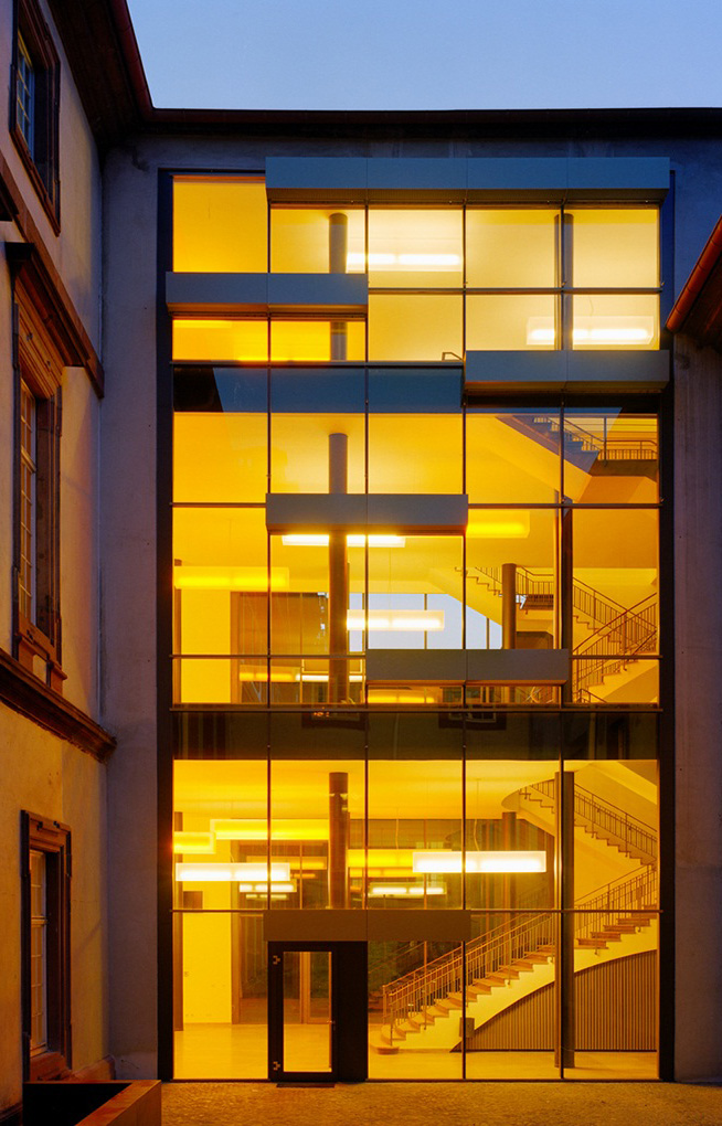 Rektoratshof der Universität Mannheim im Mannheimer Barockschloss